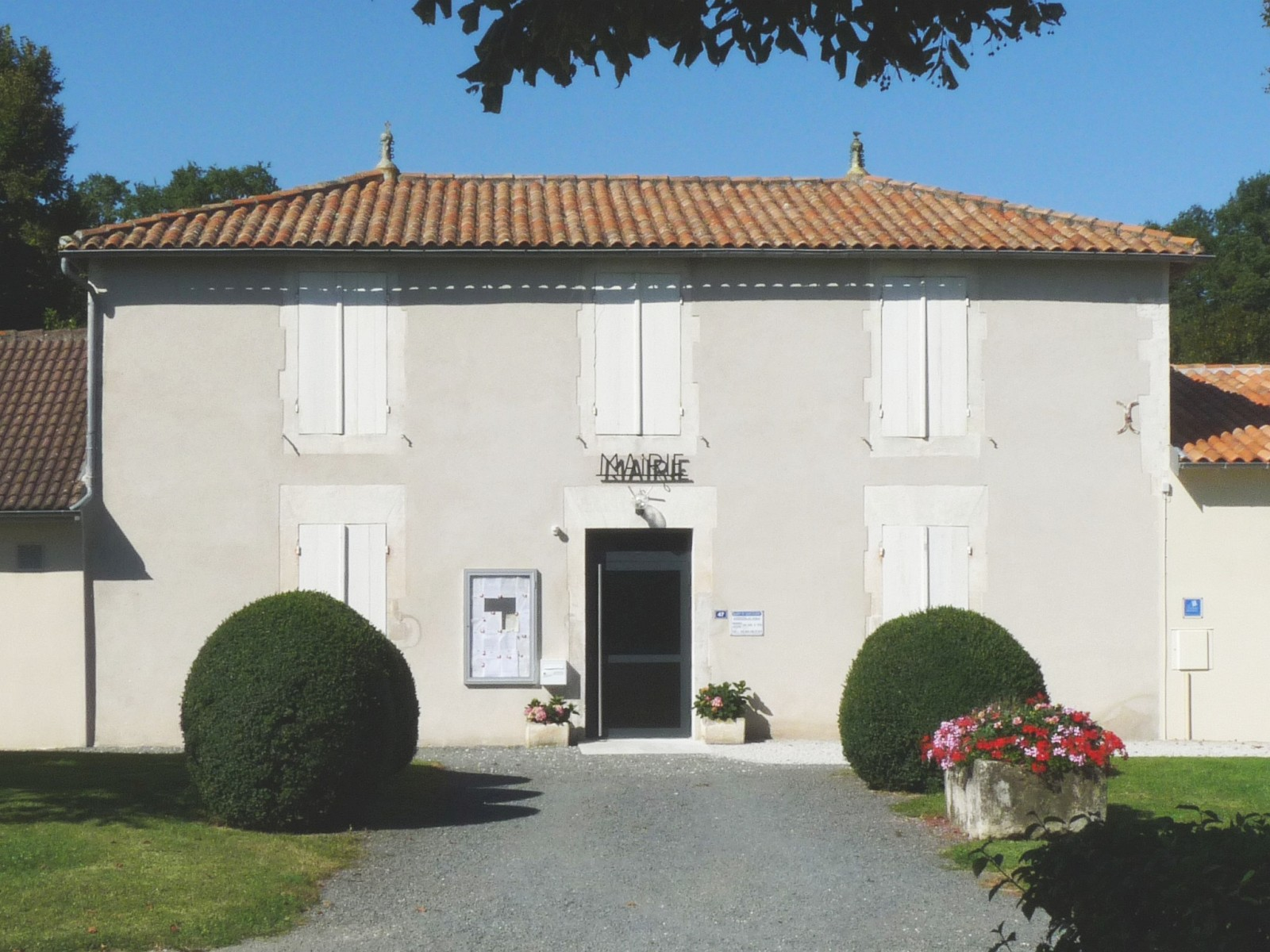 Mairie de St-Eugène, Charente-Maritime, France